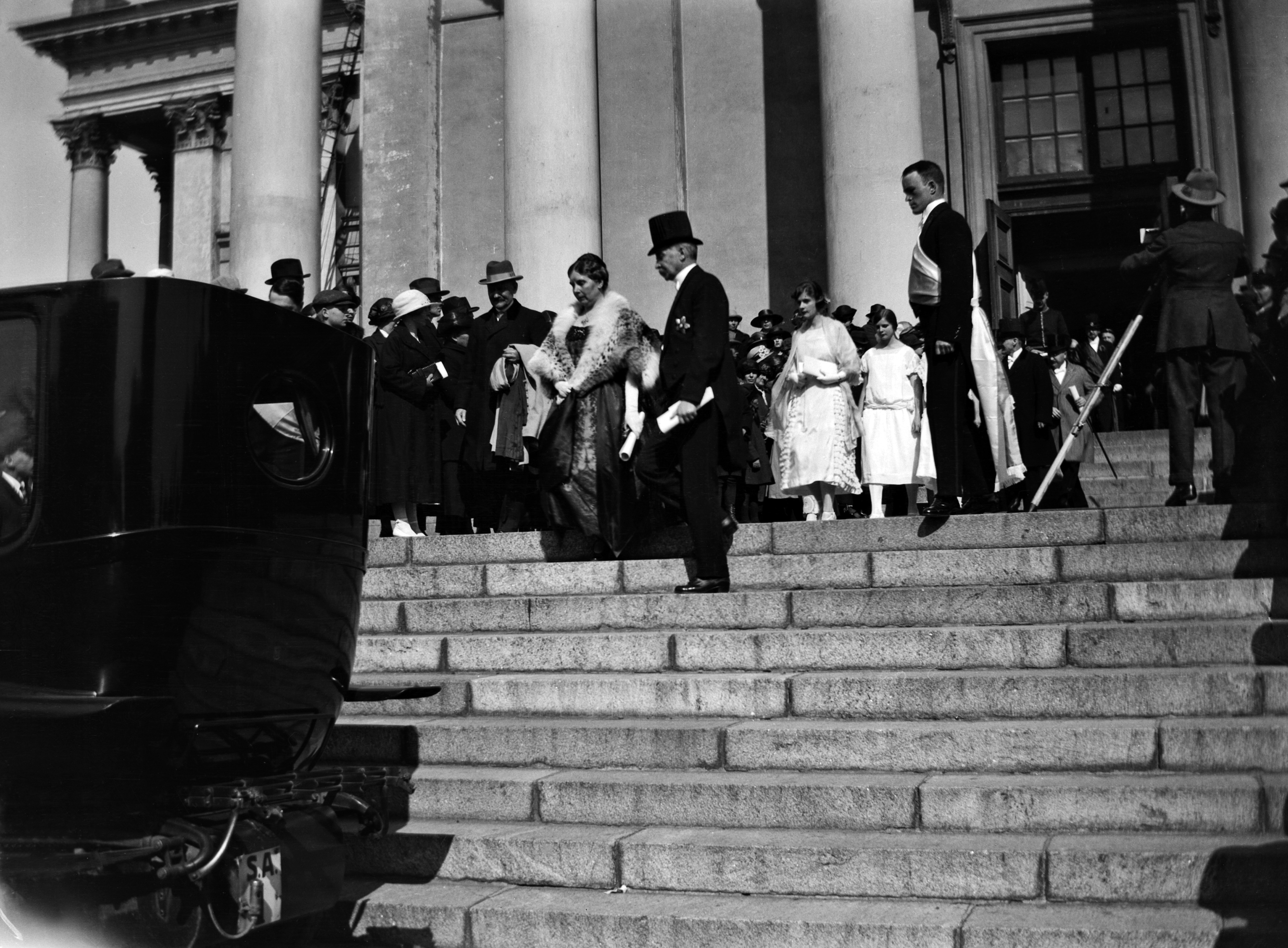 Keisarillisen Aleksanterin yliopiston promootio. Tasavallan presidentti K.J. Ståhlberg perheineen tulossa promootiojumalanpalveluksesta Nikolainkirkosta (Helsingin tuomiokirkko). -- negatiivi, nitraatti, mv